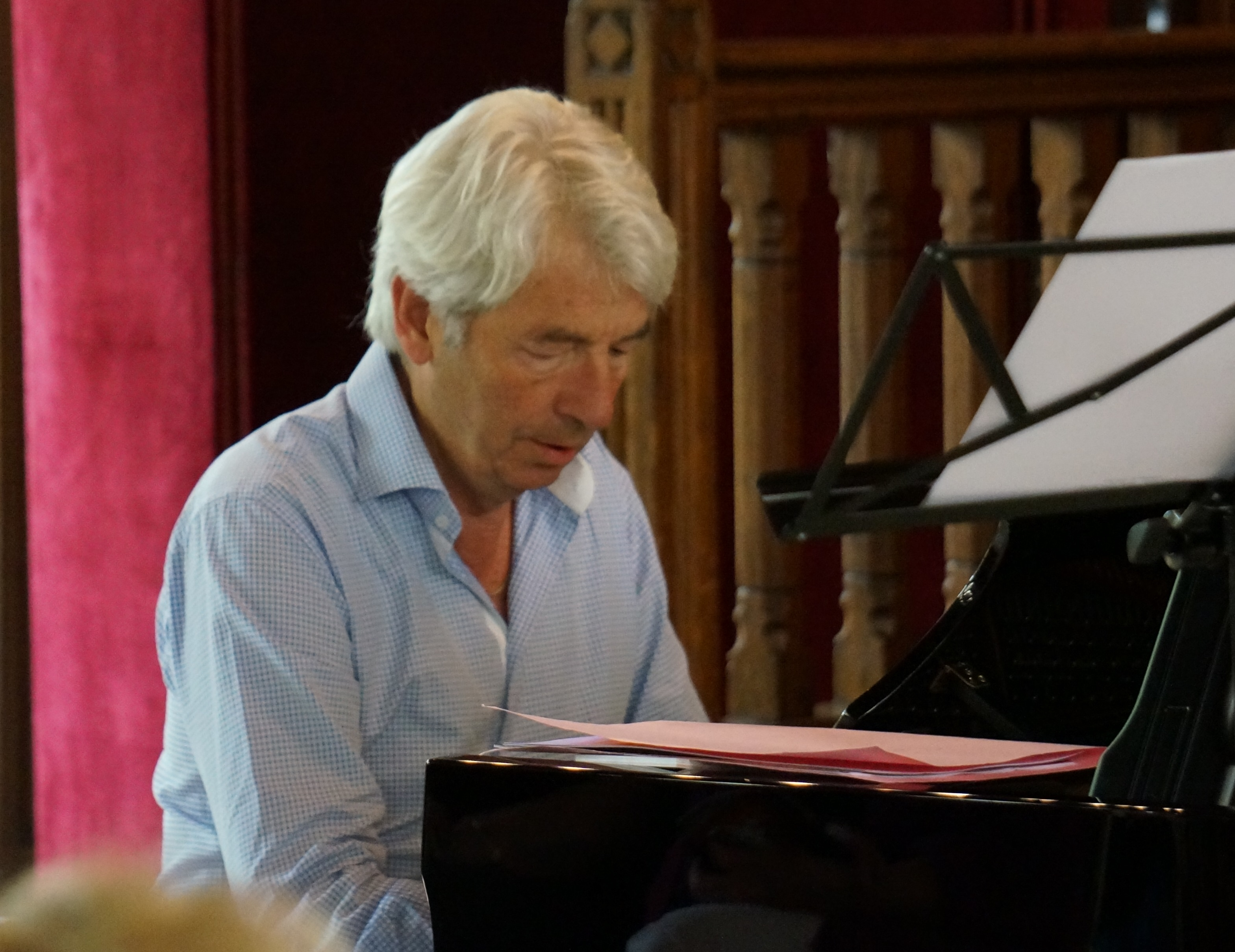 Jean-Philippe Collard lors des Flâneries Musicales, 2014.